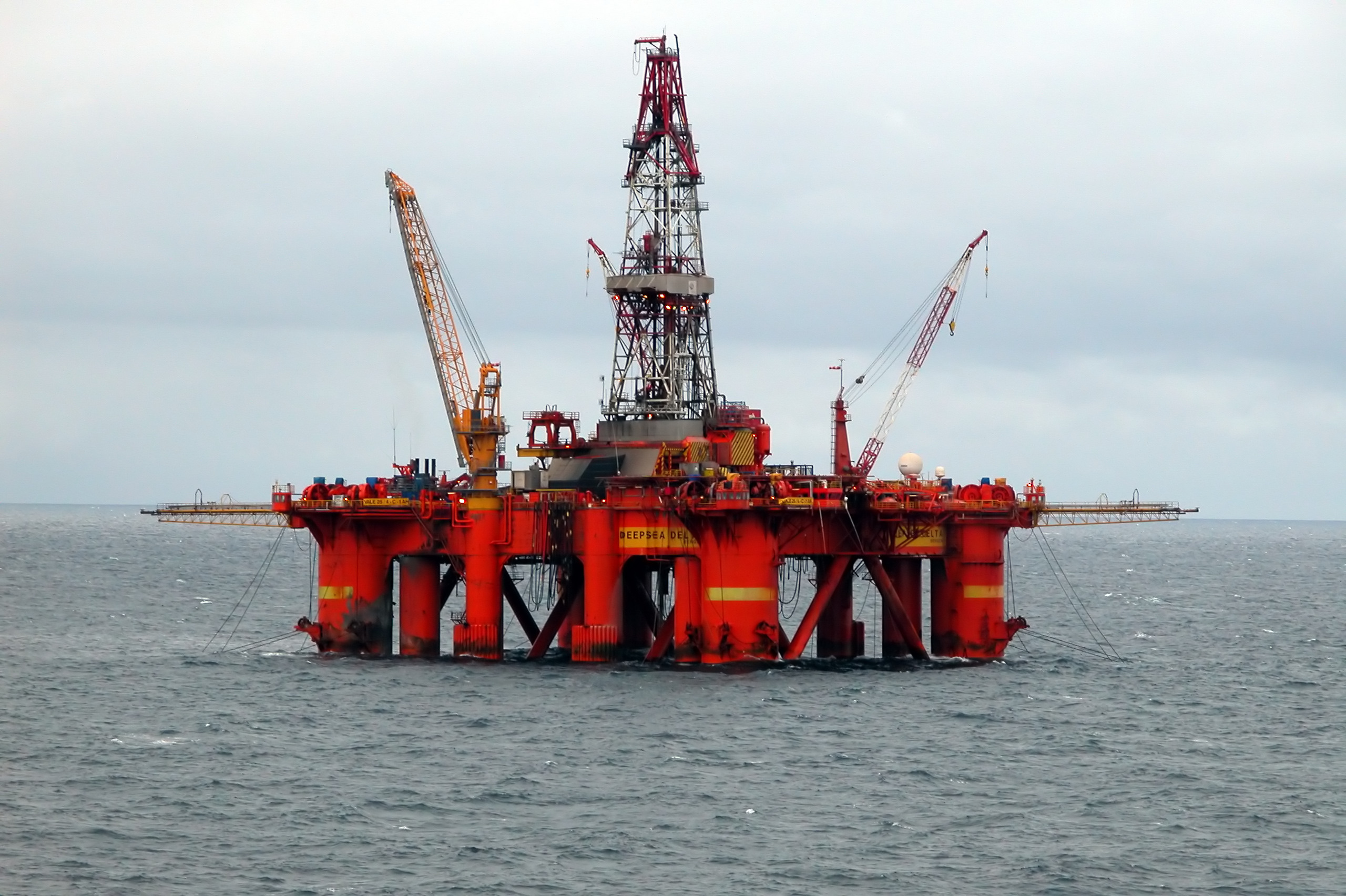 «Deep Sea Delta», boreplattform, her i Nordsjøen